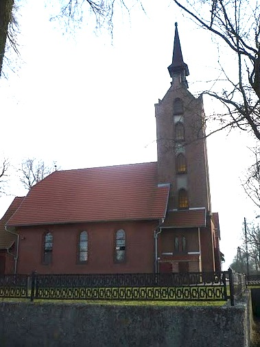 Nojewo 11 - dawny kościół ewangelicki, obecnie parafialny rzymskokatolicki pw. św. Andrzeja Boboli, 1865 (zabytek nr 2575/A)